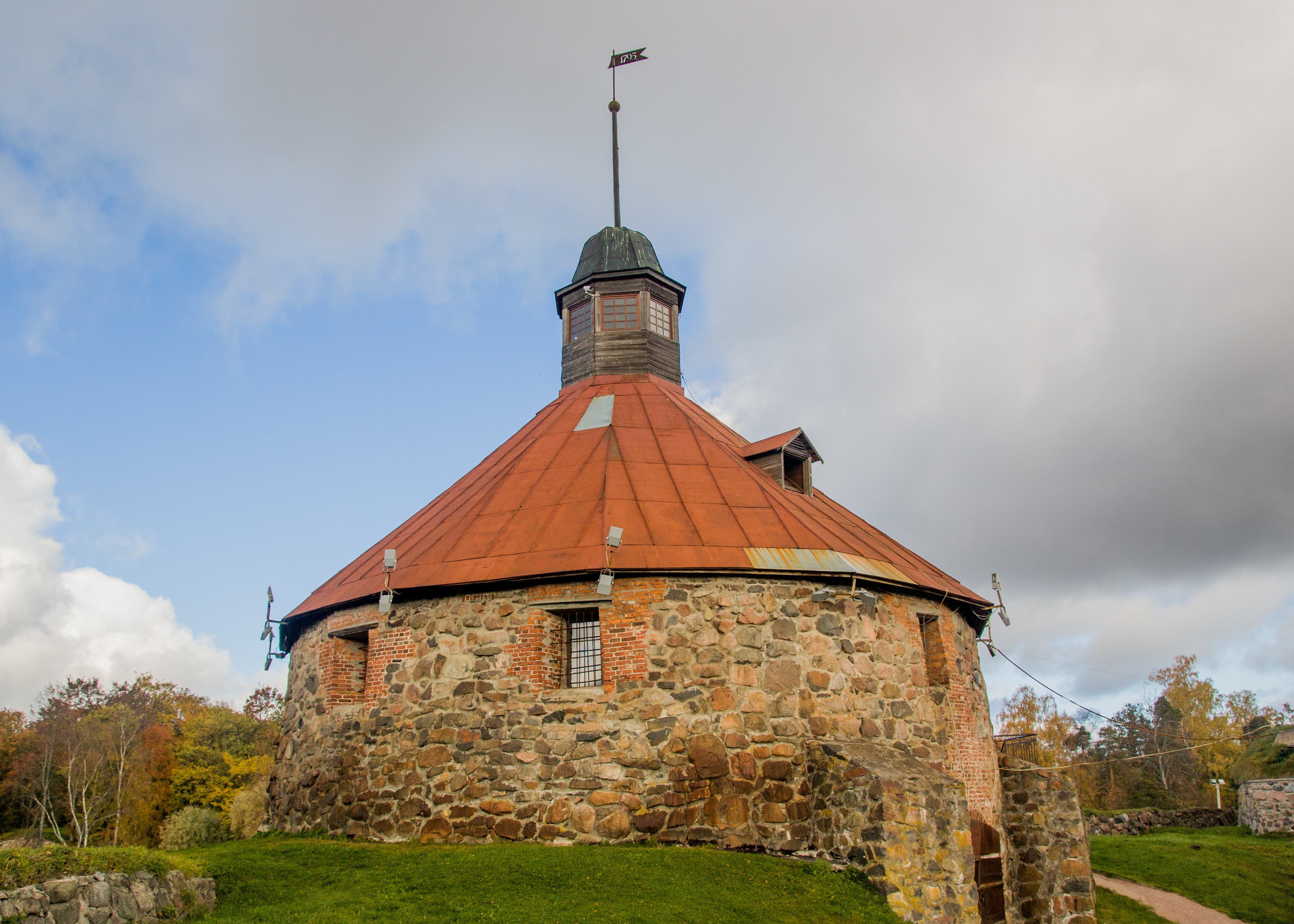 Башня Круглая, крепость Корела (Лен.область, Приозерск, Ленинградское шоссе, 3)